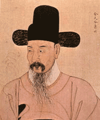 문곡 김수항의 영정